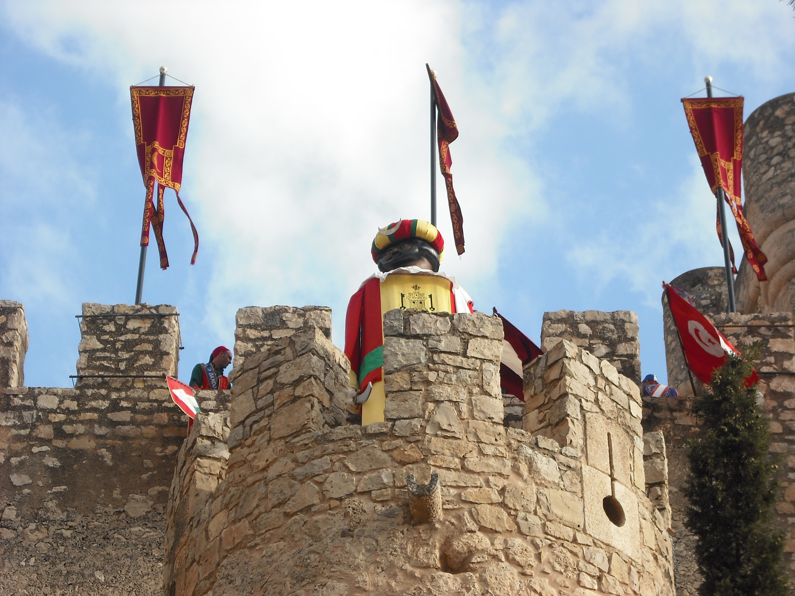 Imagen de la Mahoma en la torrecilla de entrada al Castillo de la Atalaya durante las fiestas de Moros y Cristianos de Villena.